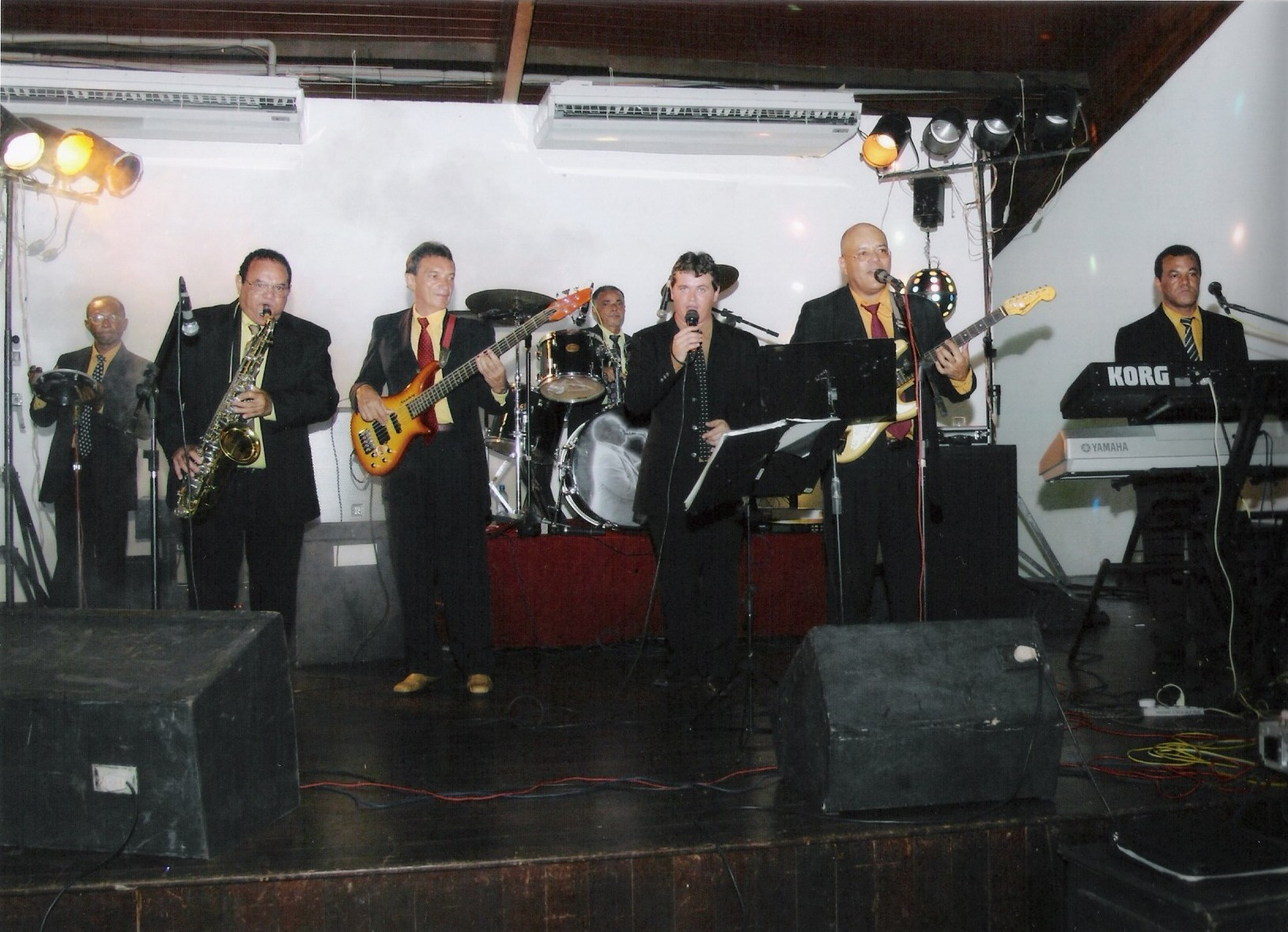 Banda Marinho & seus Beat Boys (2009)